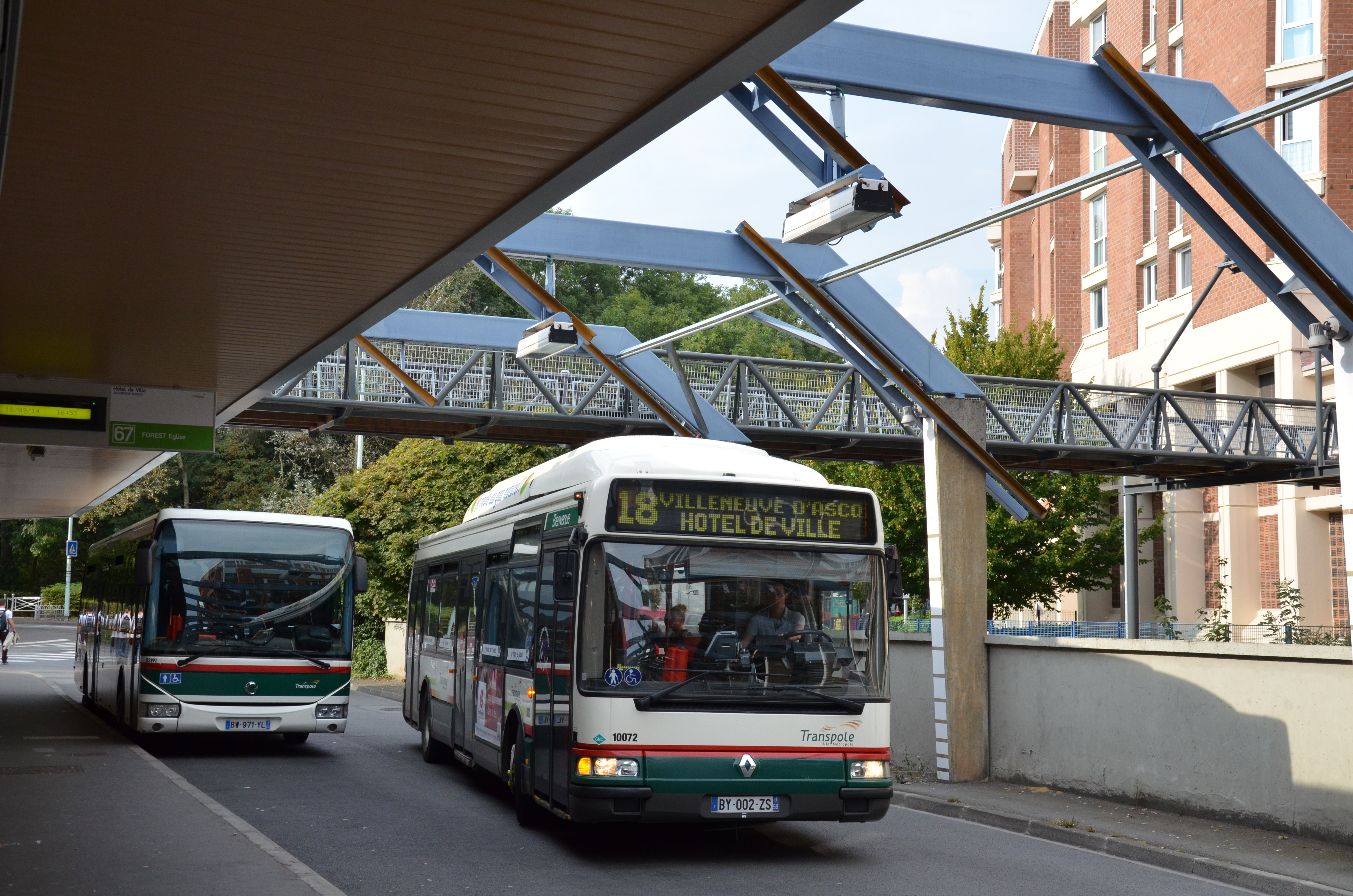 Renault Agora S GNV n°10072 à l'approche de son terminus Villeneuve d'Ascq Hôtel de Ville, sur la ligne 18 du réseau Transpole de Lille.